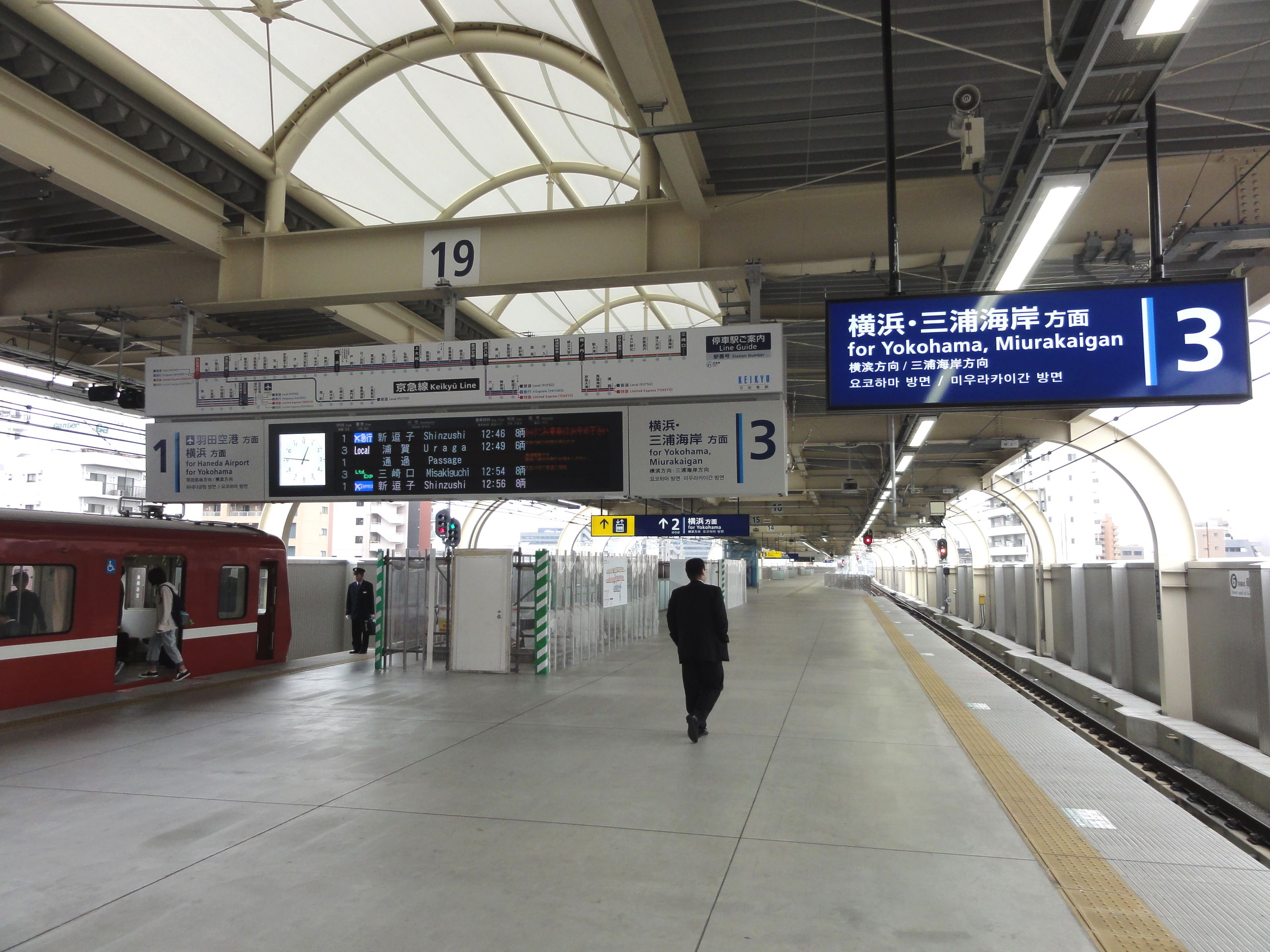 京急蒲田駅 １・３番ホーム